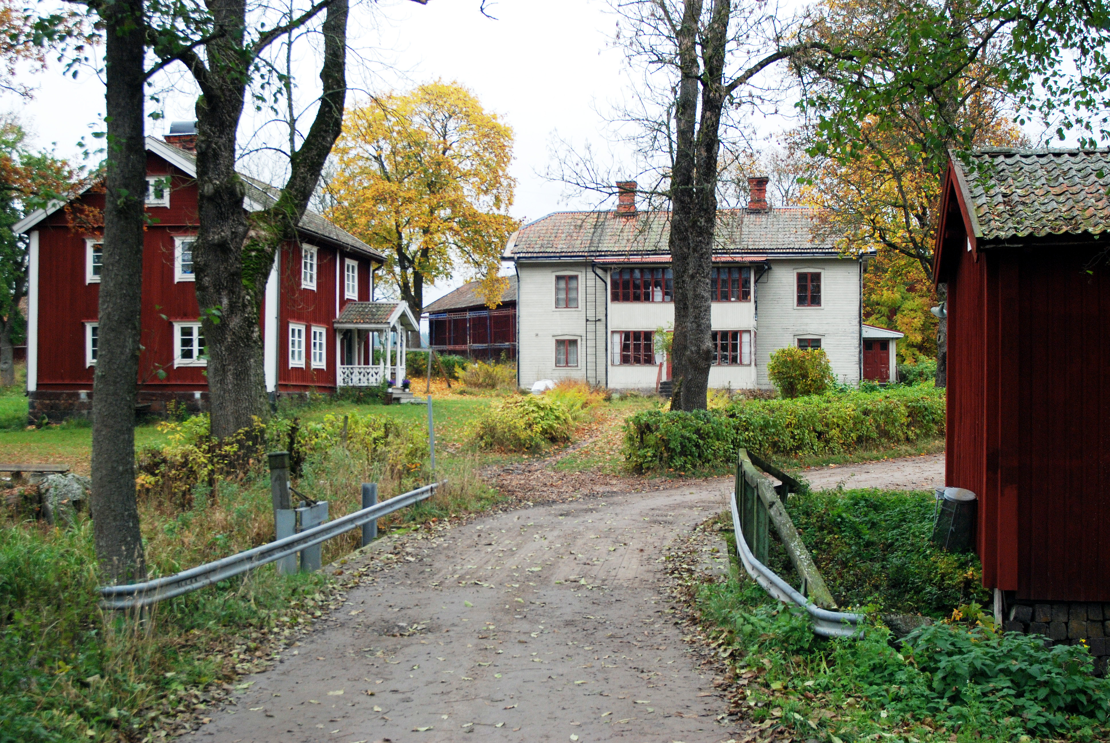 "Bergsmansgård", Livsdal village, Norbergs kommun, Sverige. GPS: N60 01.810 E15 57.671